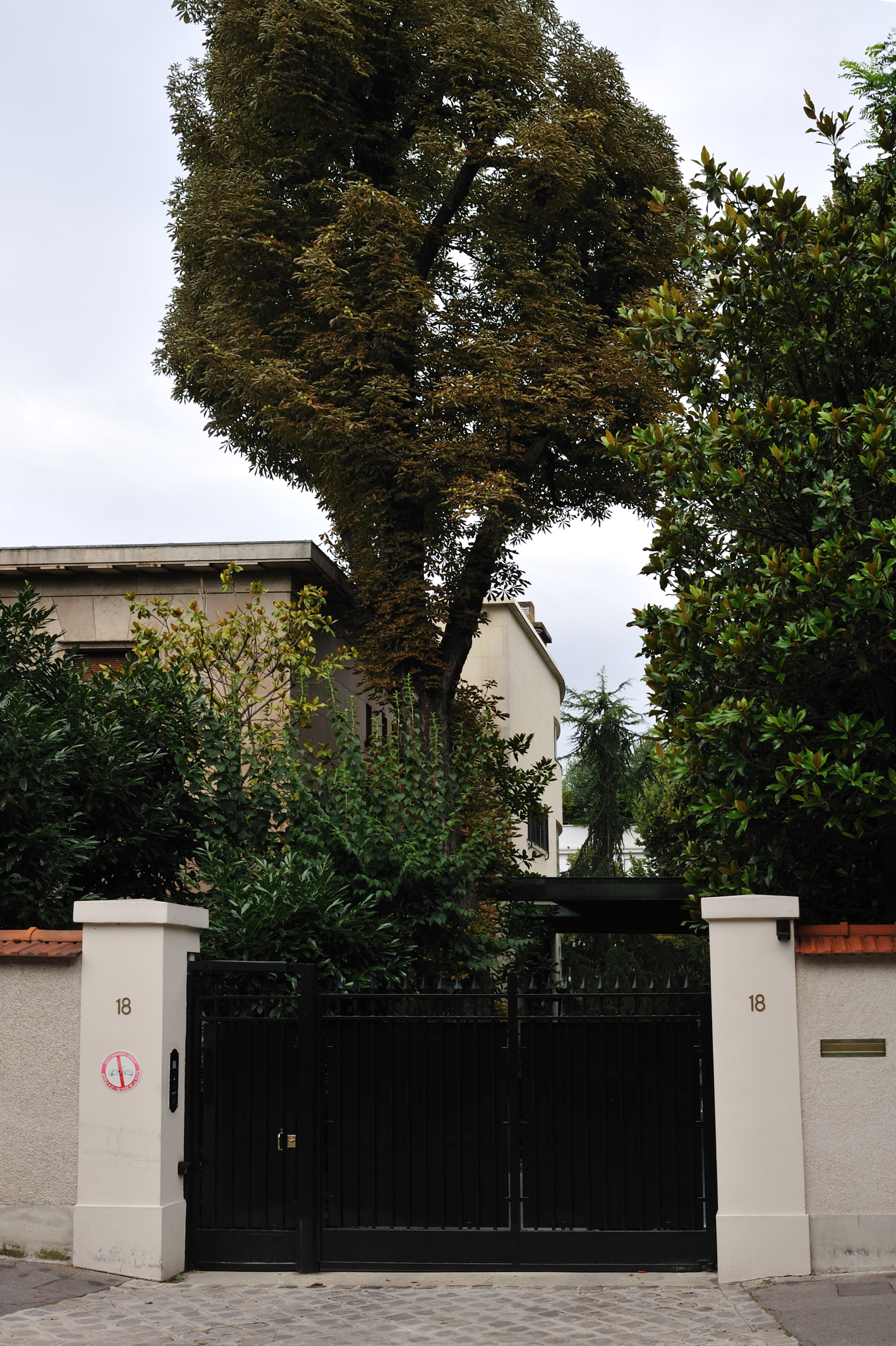 18 rue Delabordère, Neuilly-sur-Seine, Hauts-de-Seine, France